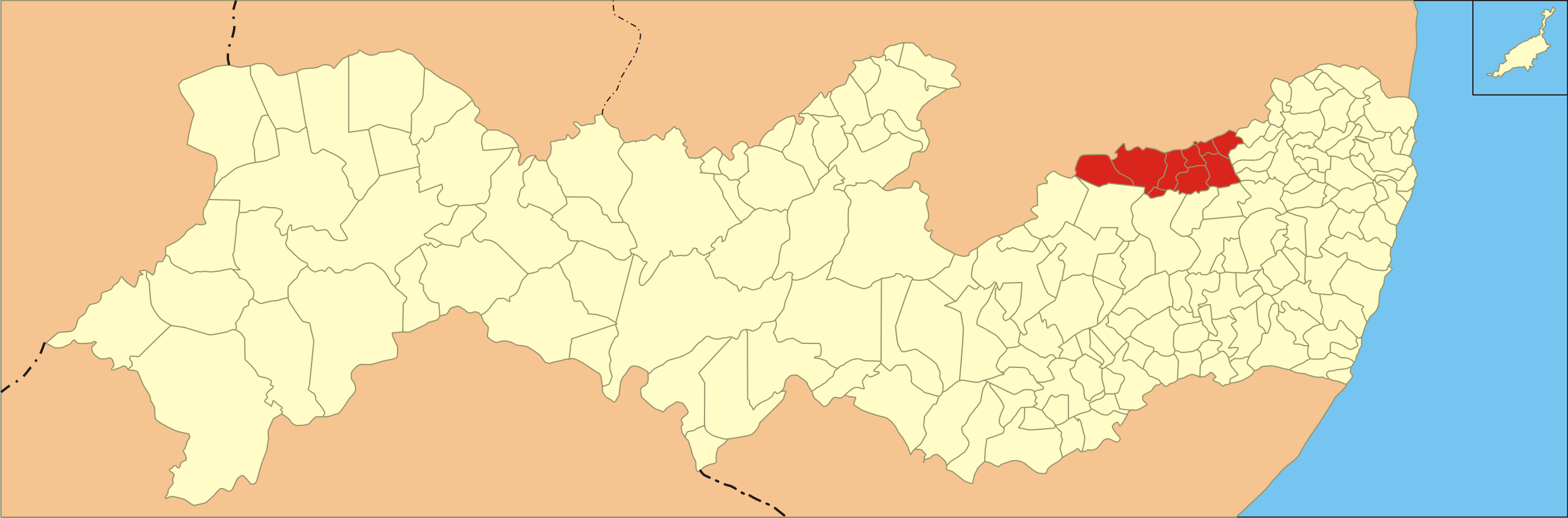 Localização da microrregião no estado de Pernambuco.